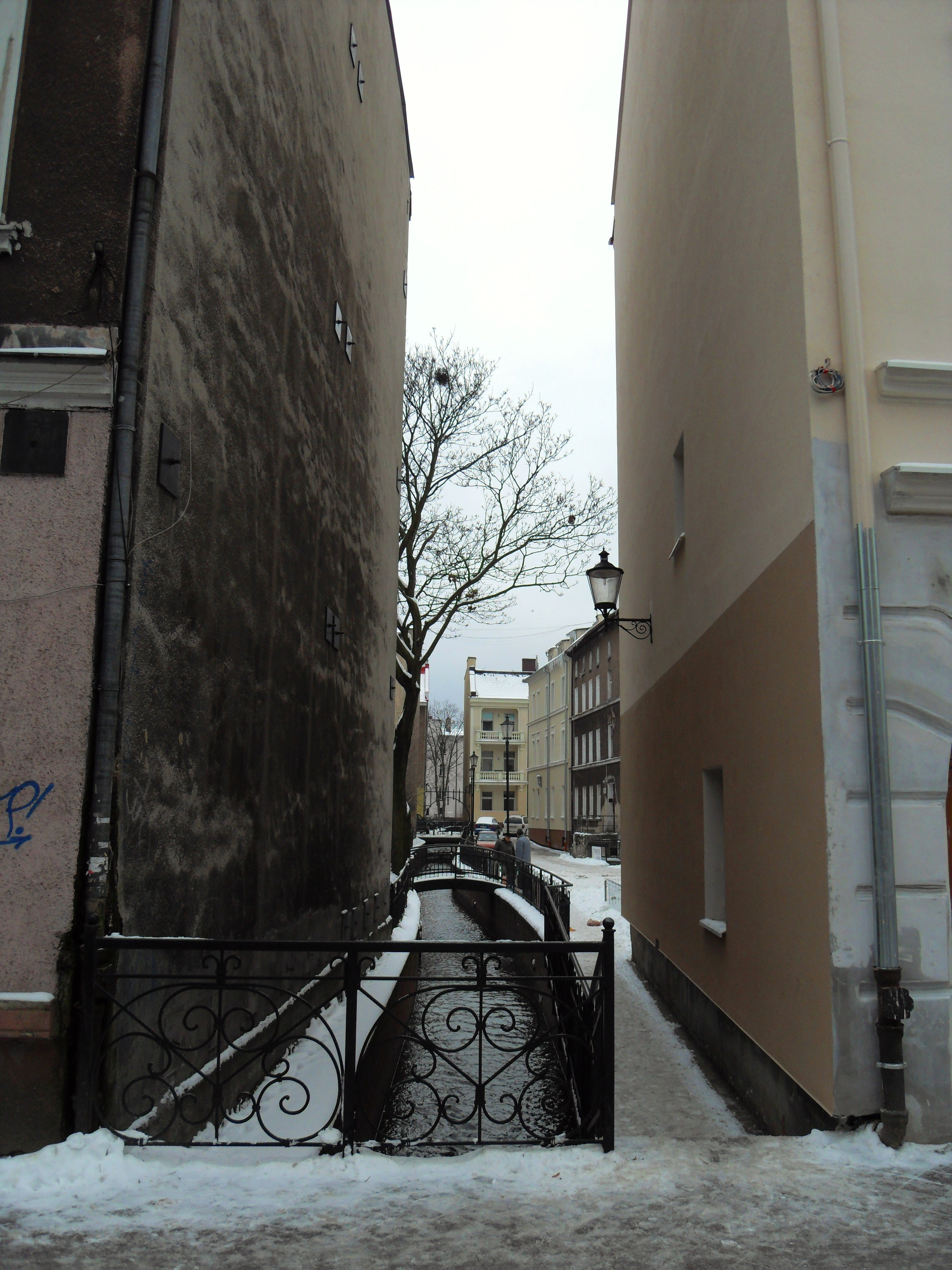 Gdańsk Wrzeszcz, Strzyża widziana z ul. Aldony. W głębi budynki przy ul. Wallenroda.